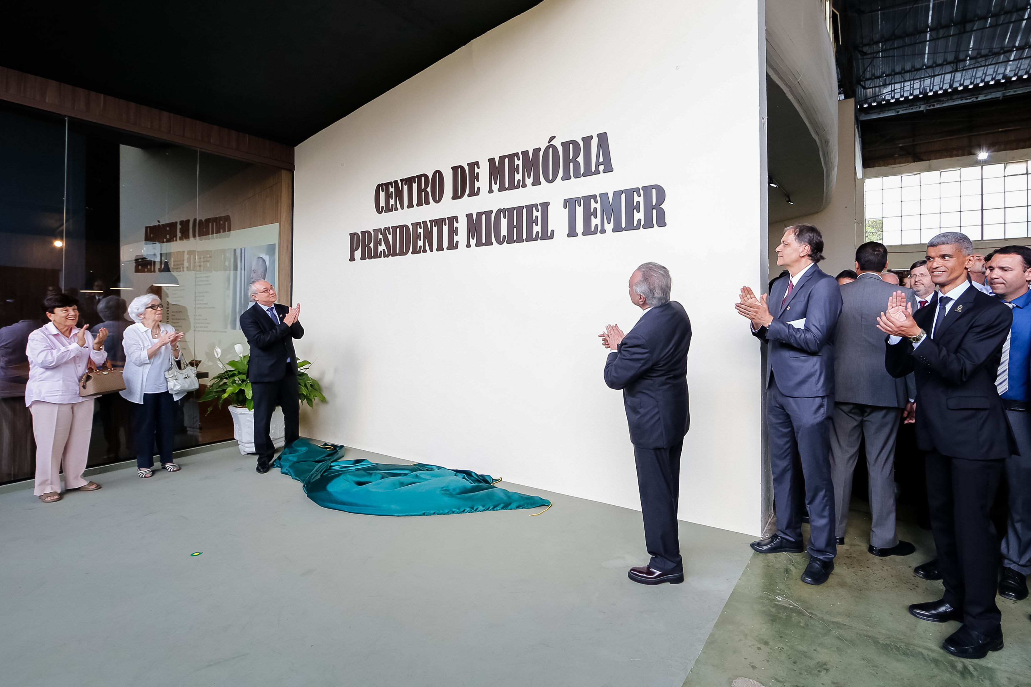 (Itu - SP, 19/12/2018) Presidente da República, Michel Temer durante descerramento do letreiro, localizado à entrada do centro de memória Michel Temer.Foto: Rogério Melo/PR